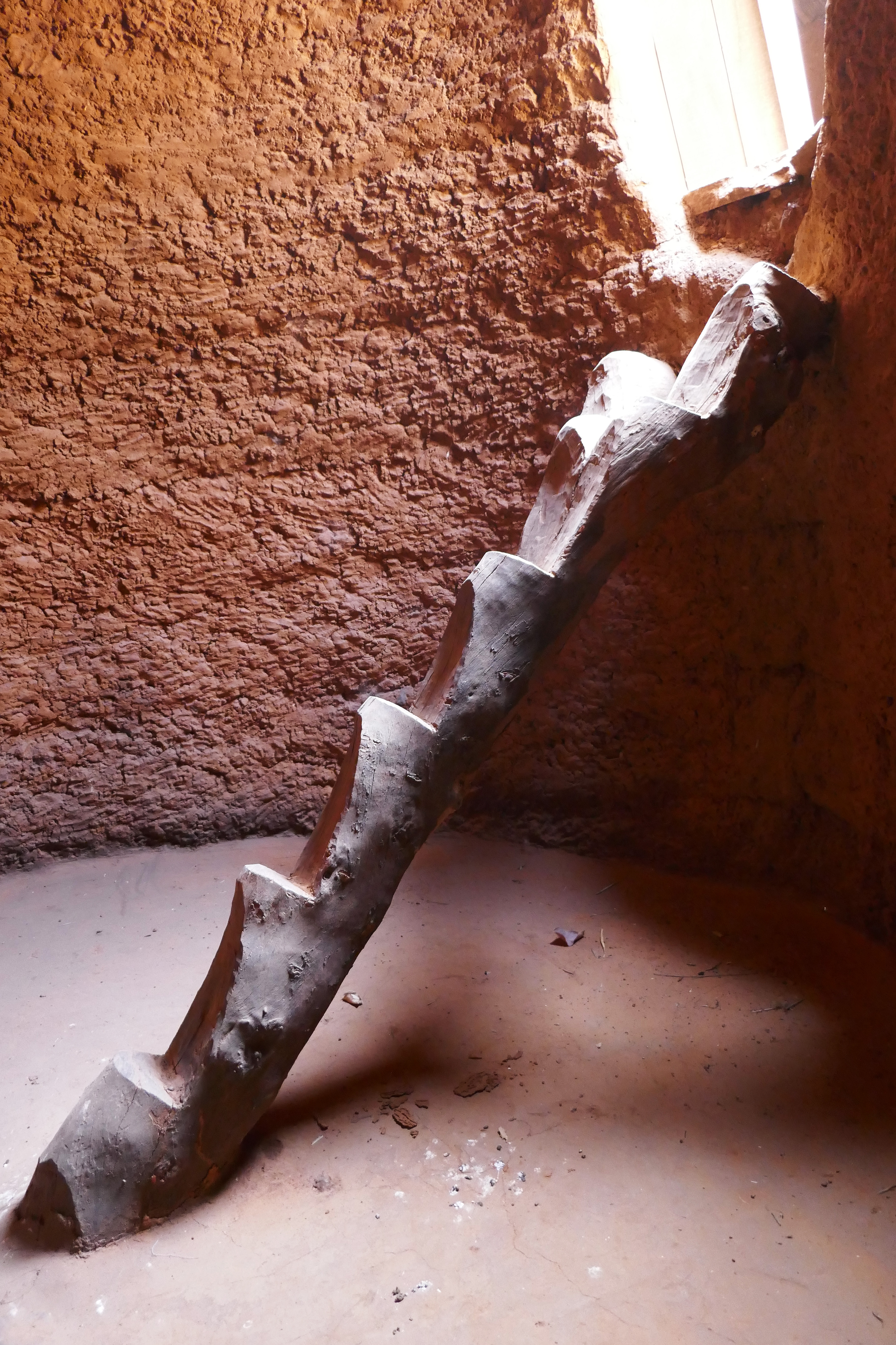 Pays Otammari, Kouaba, commune de Natitingou, Bénin : échelle en bois dans un hôtel en construction, à la manière des tatas sombas.